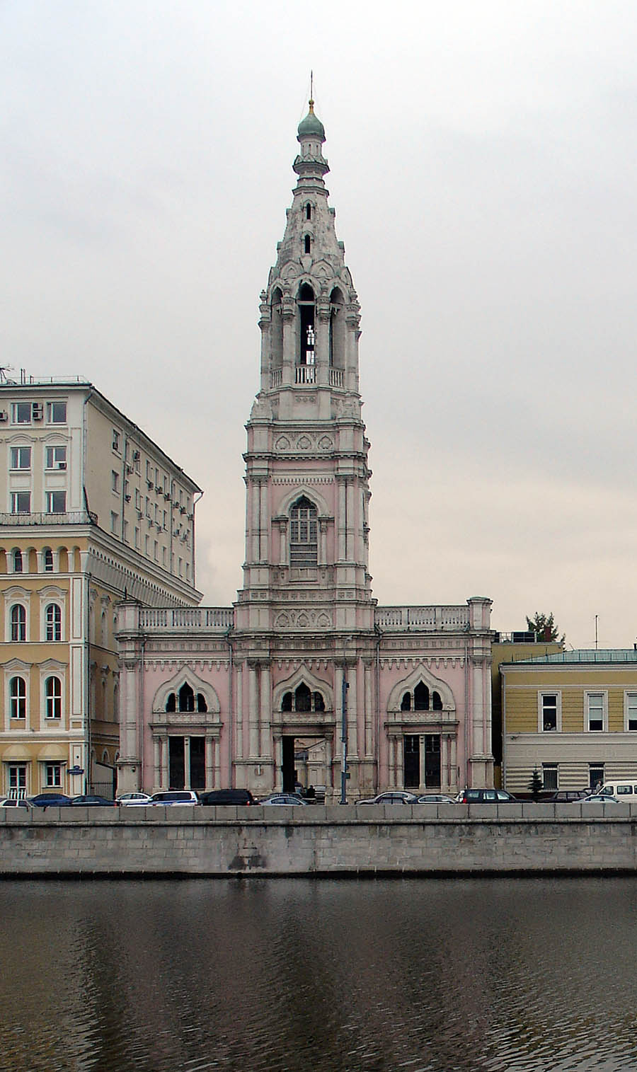 Sofiyskaya Embankment, Moscow